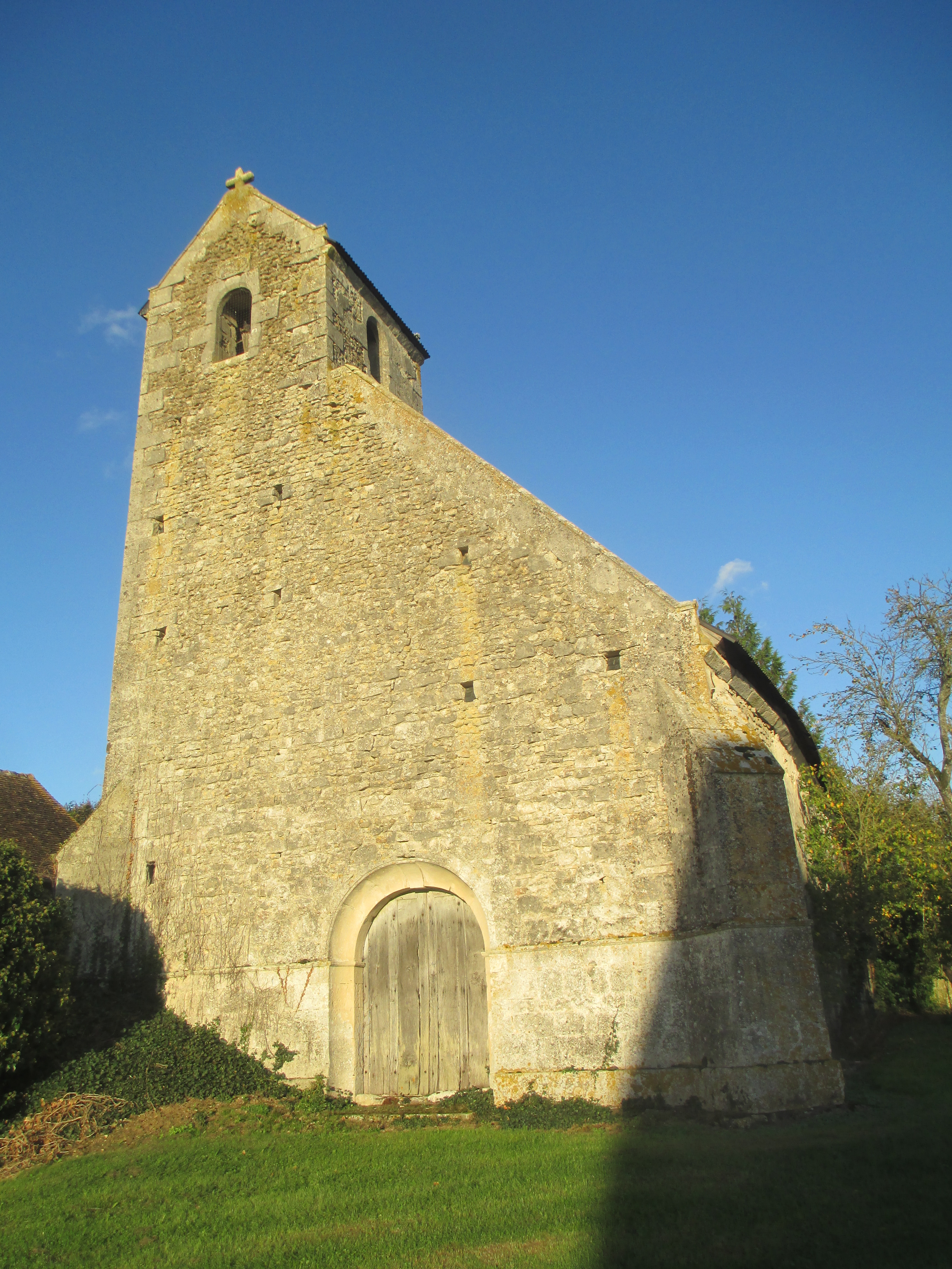 Église Saint-Julien de Montrenault, sur la commune Saosnes dans la Sarthe.